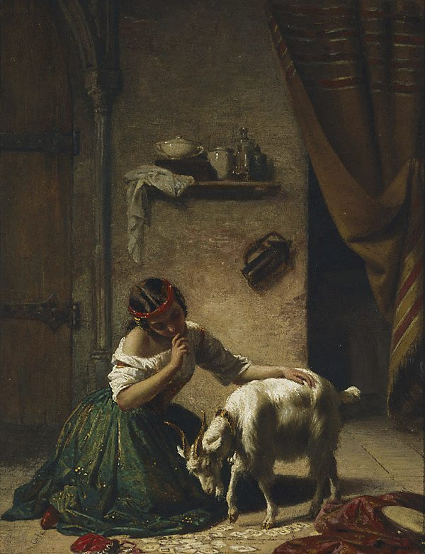 The Spelling Lesson, hule sur toile de William Gale, s.d. (avant 1909).